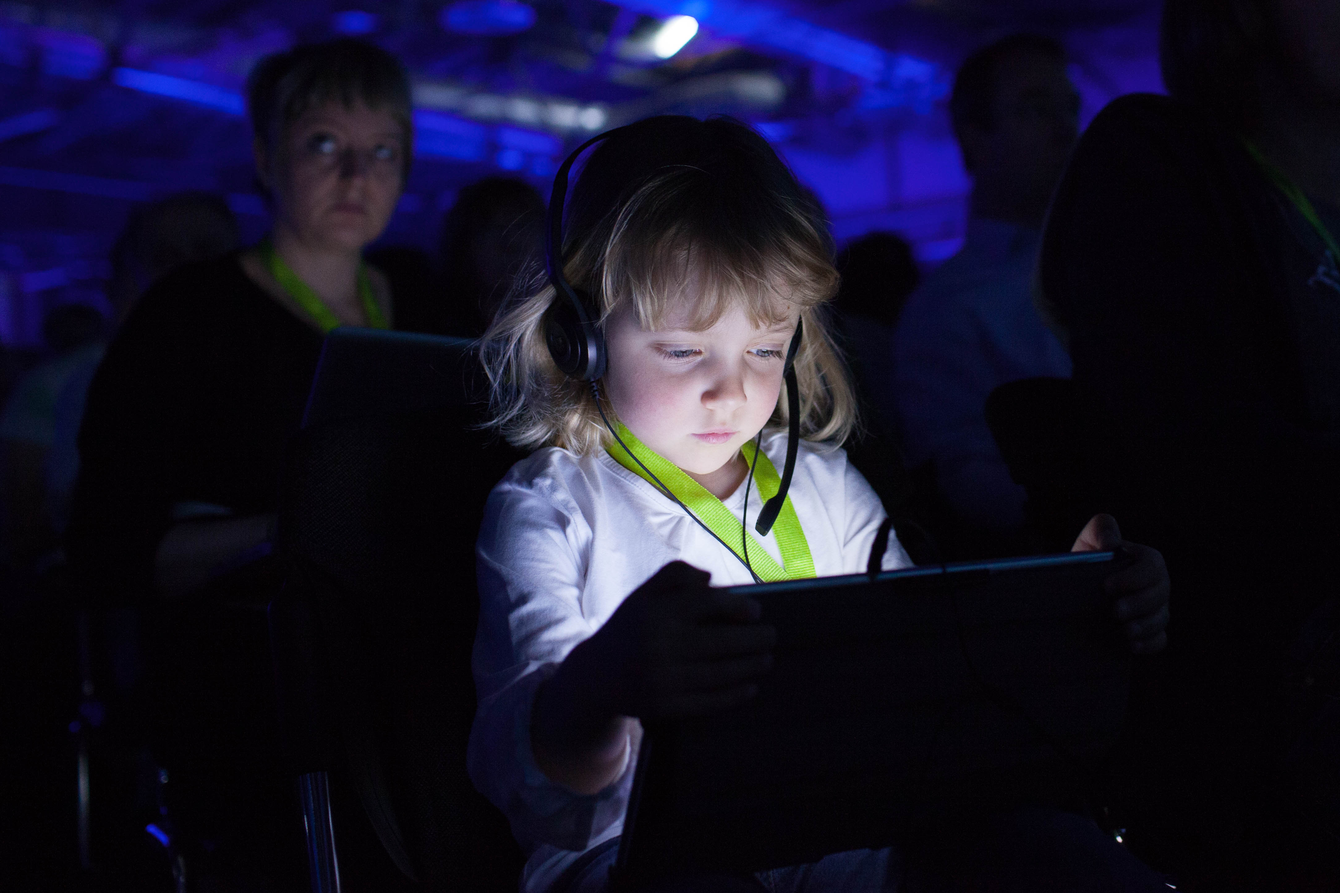 Kleines Mädchen schaut gespannt auf ein Tablet auf der re:publica 2015 am 06.05.2015 in Berlin. Copyright: re:publica/Jan Zappner